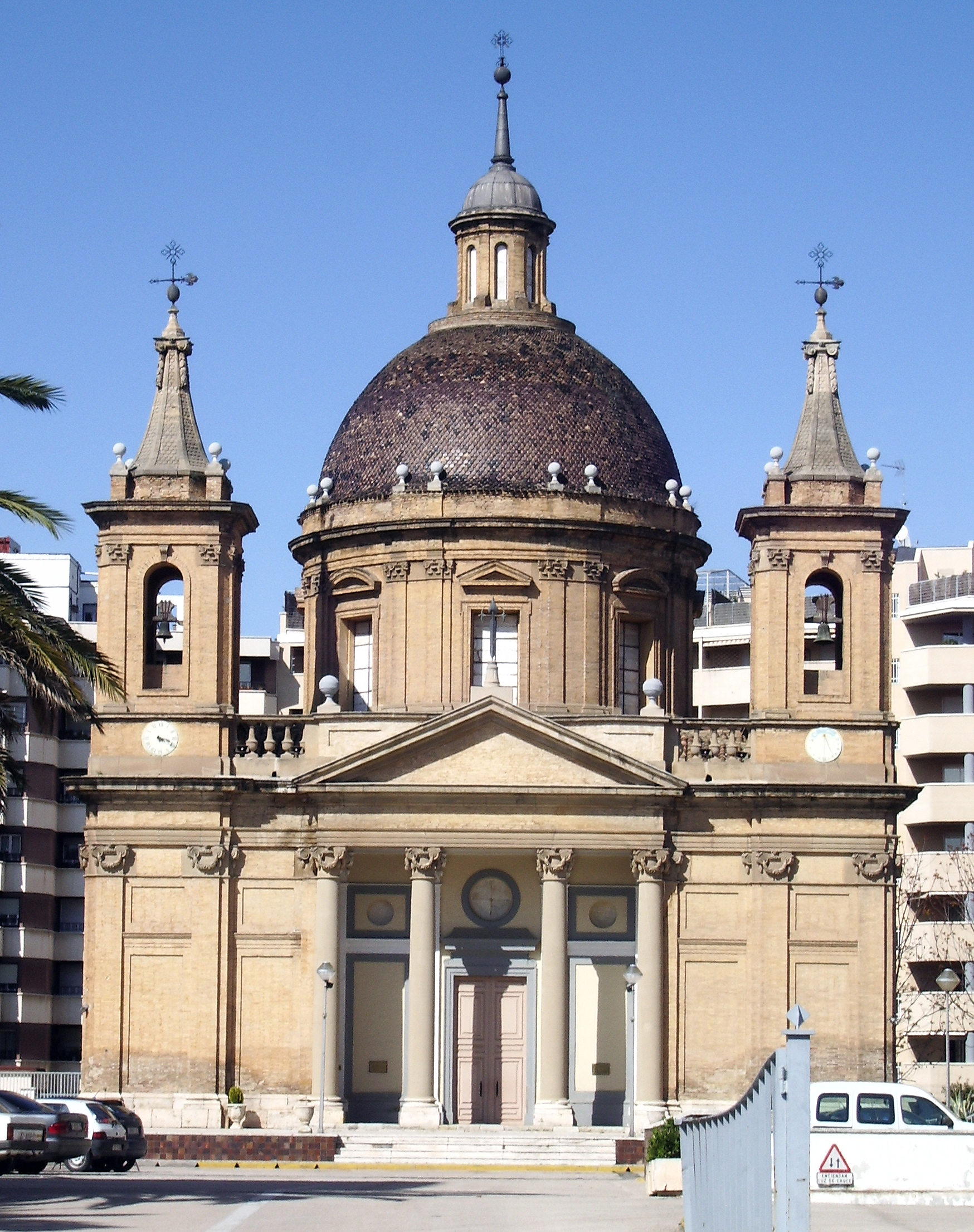 Iglesia de San Fernando de Torrero (Zaragoza, España)